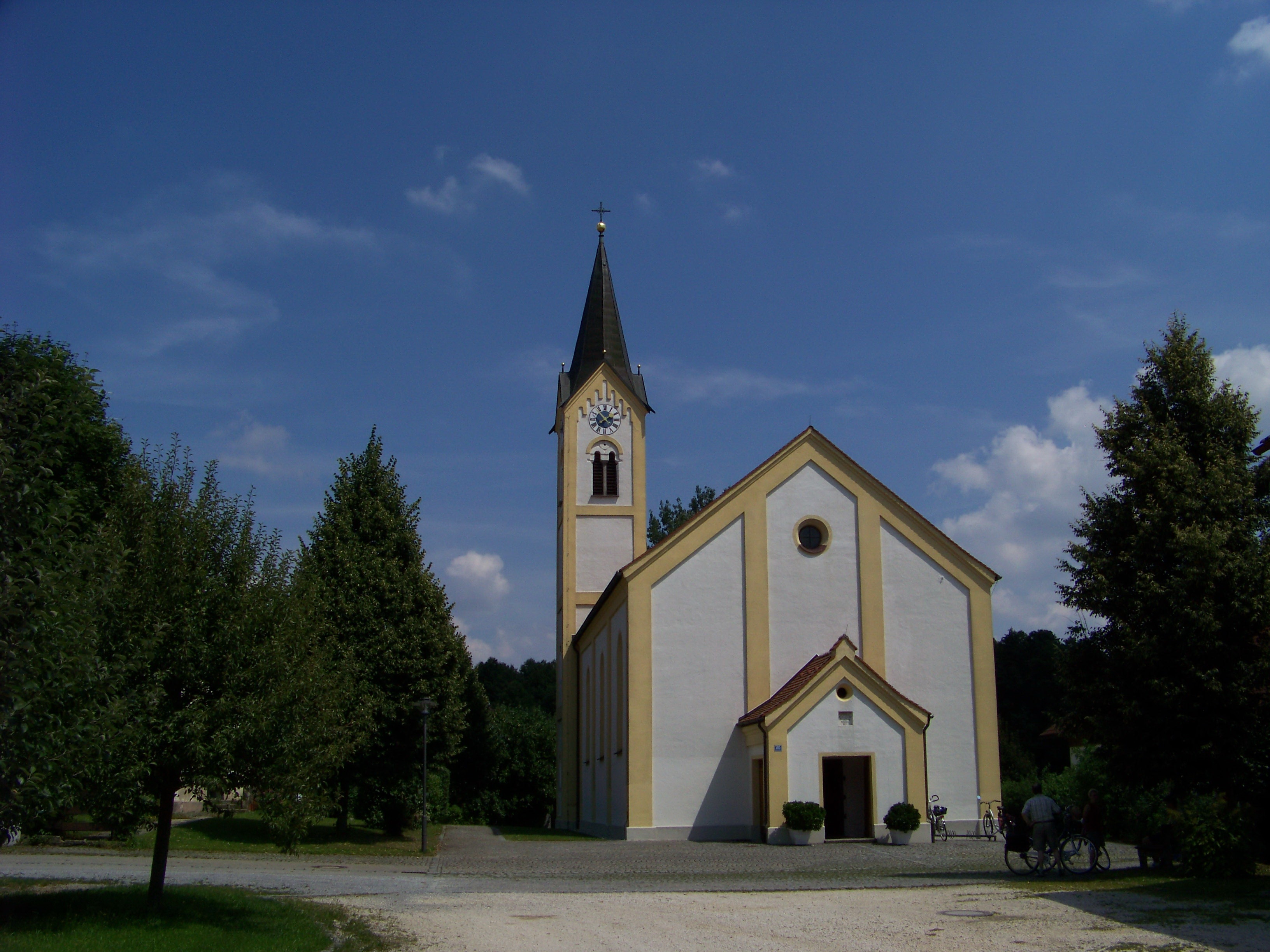 Mallersdorf-Pfaffenberg. Oberhaselbach 505. Katholische Filialkirche St. Martin. Neubau 1878/79. Saalraum mit drei Fensterachsen, eingezogener, dreiseitig geschlossener Chor mit barockem Gewölbe. Neuromanischer Turm mit Spitzhelm. Rundbogige Blendarkaden in den Turmgiebeln. Westliches Vorzeichen.